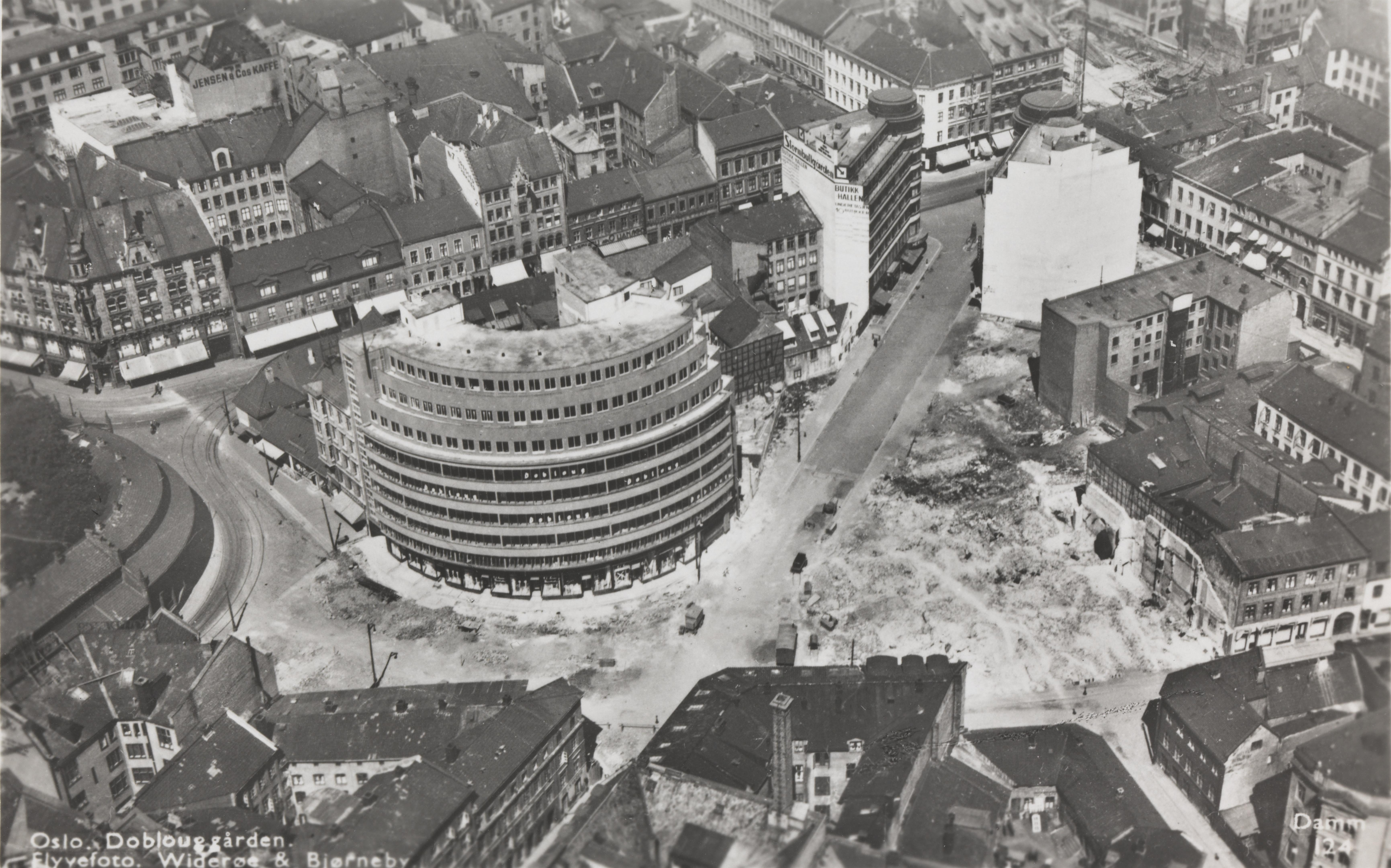 Bildet er hentet fra Nasjonalbibliotekets bildesamling Oslo, Oslo